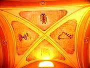 peintures des symboles de l'Ancien Testament (église Saint-François-de-Sales d'Habère-Poche)